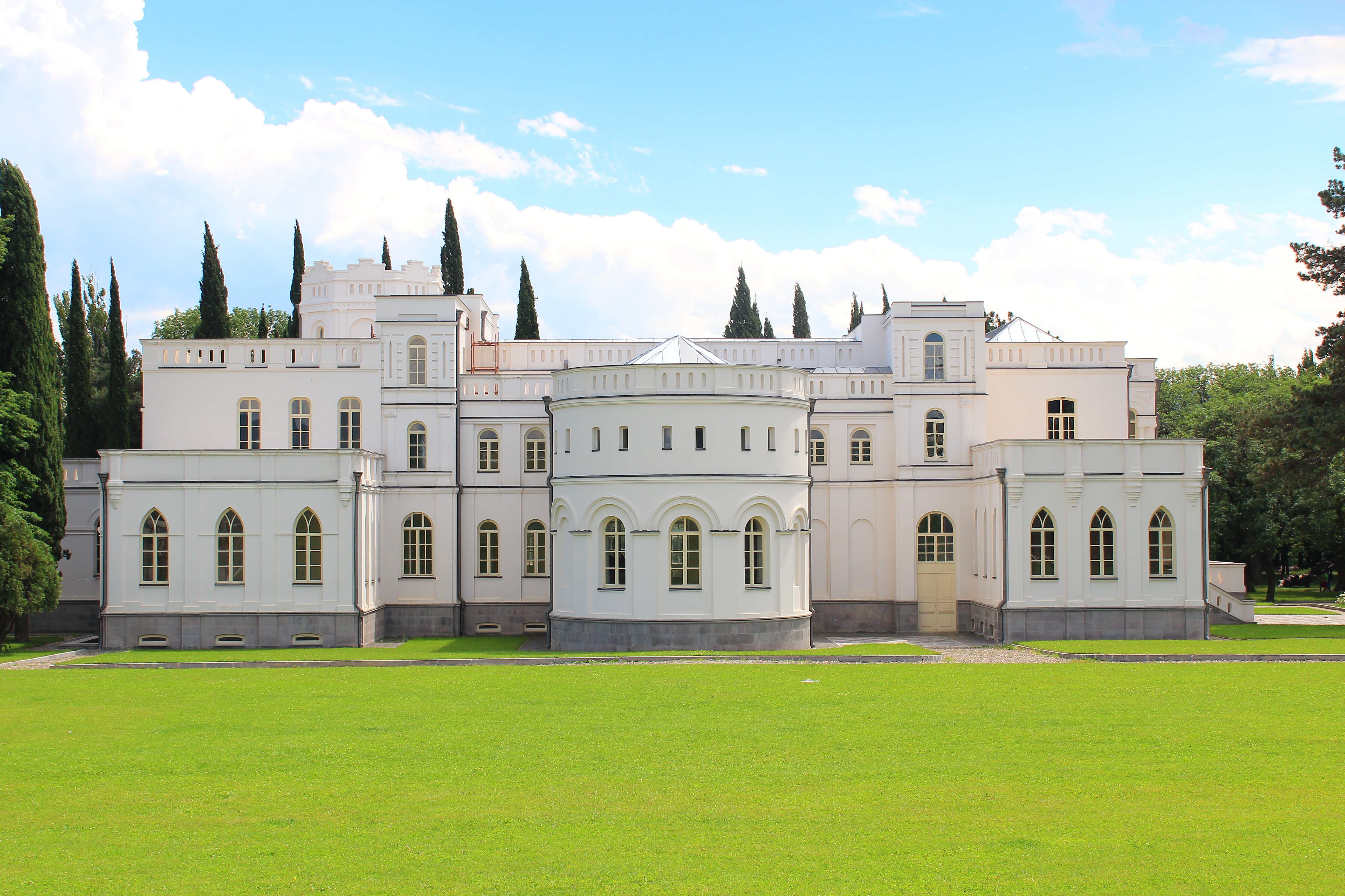 მუხრანბატონის სასახლე